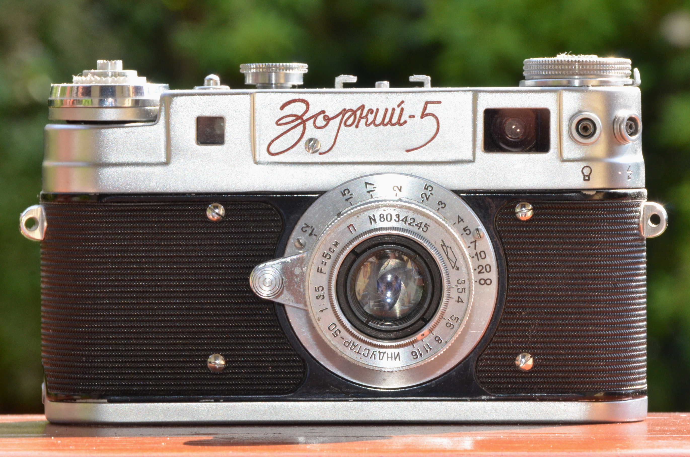 Kamera "Zorki-5" (Seriennummer: 5822638, Baujahr: 1958) mit Objektiv Industar-50 1:3,5 F=5cm (Seriennummer: 8034245)